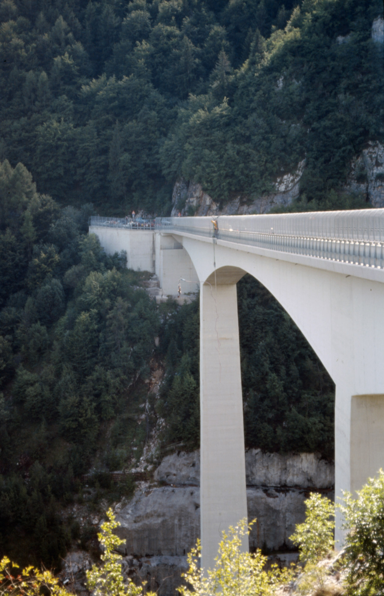 Viadotto della Val Gadena, 175m di salto, Italia